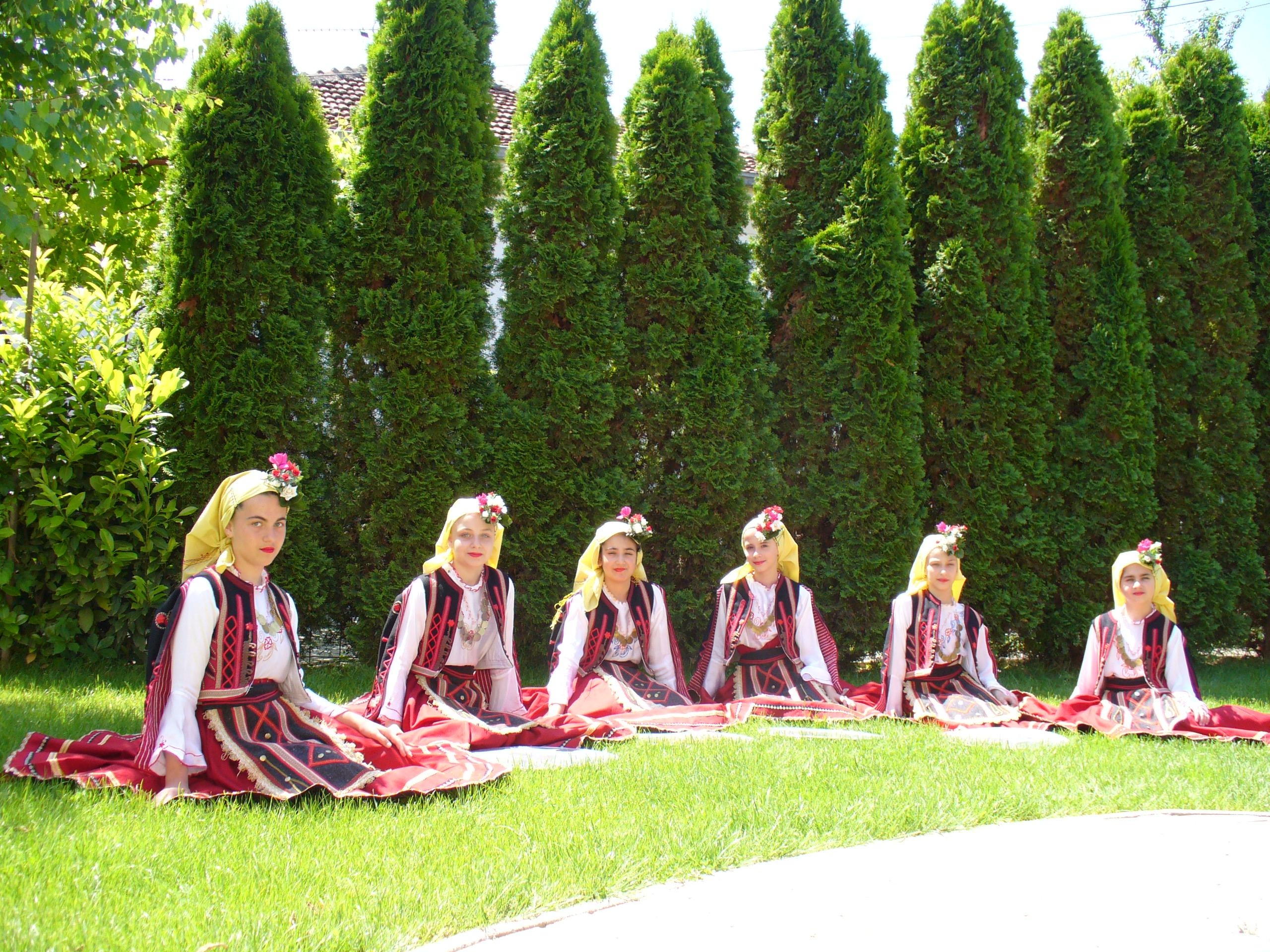 Калајџиско оро